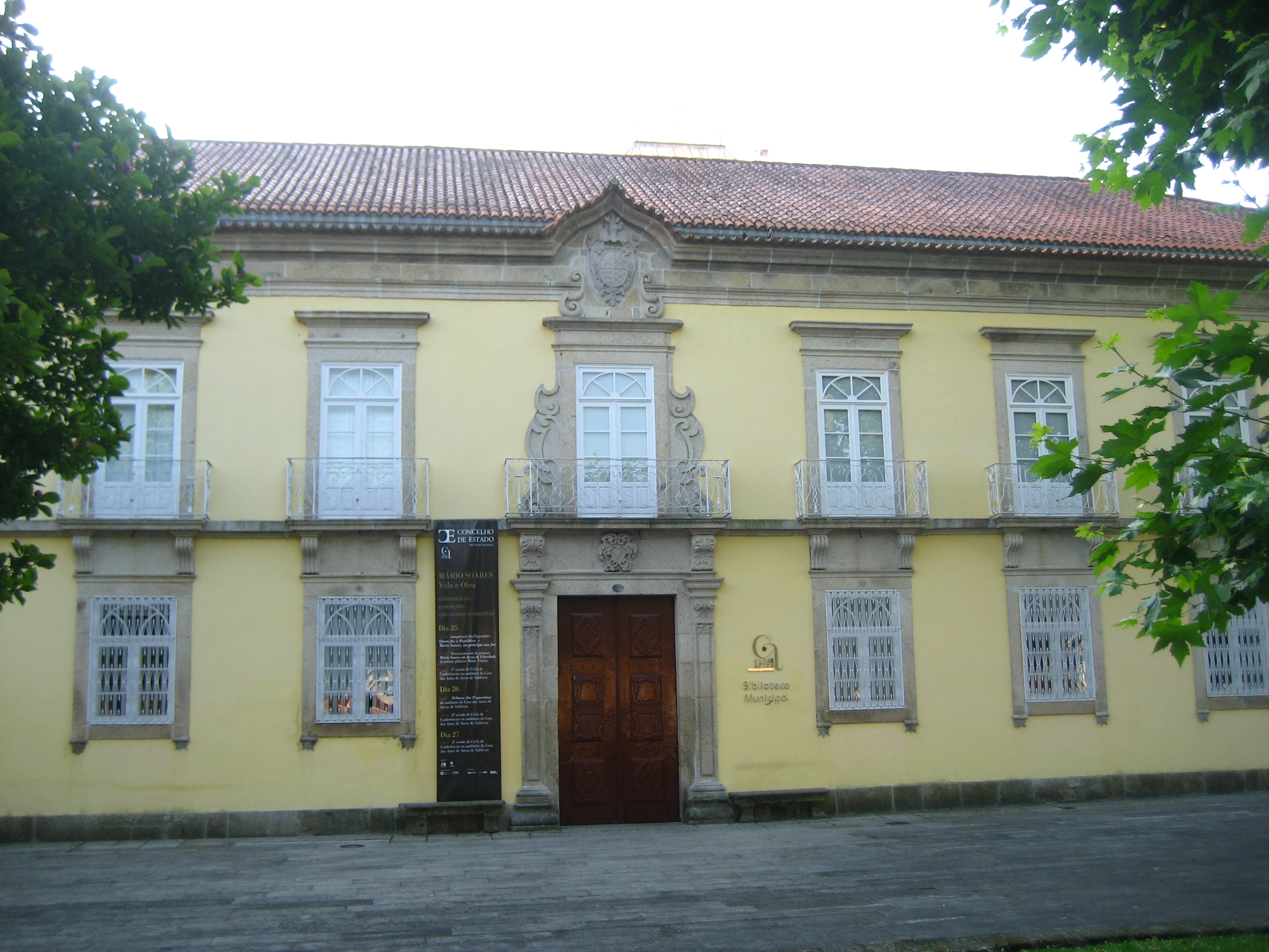 Bibliothèque, Arcos de Valdevez, Portugal